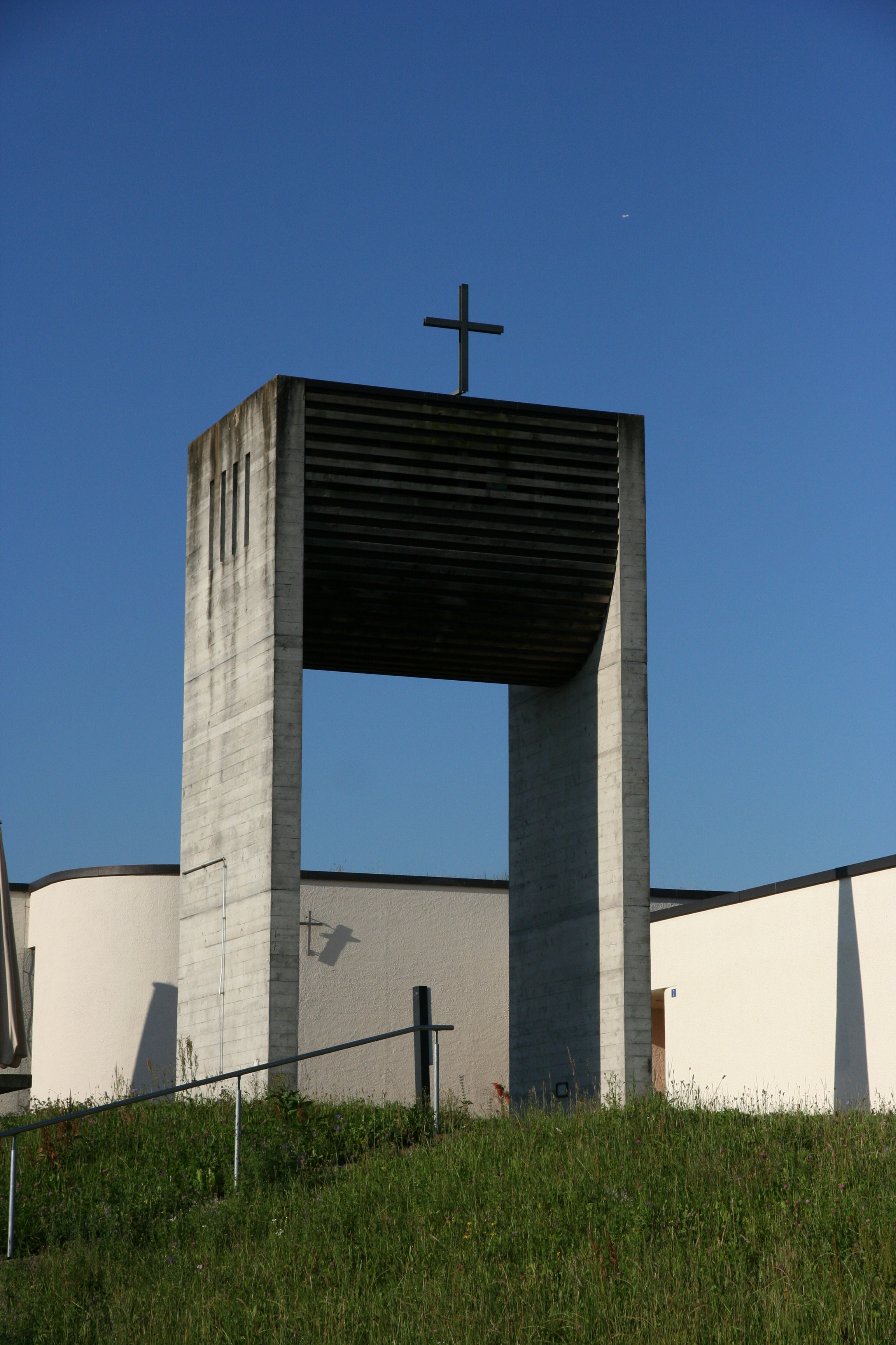 Römisch-katholische Pfarrkirche St. Burkard Mettmenstetten ZH